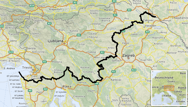 carte réalisée sur umap, [1]